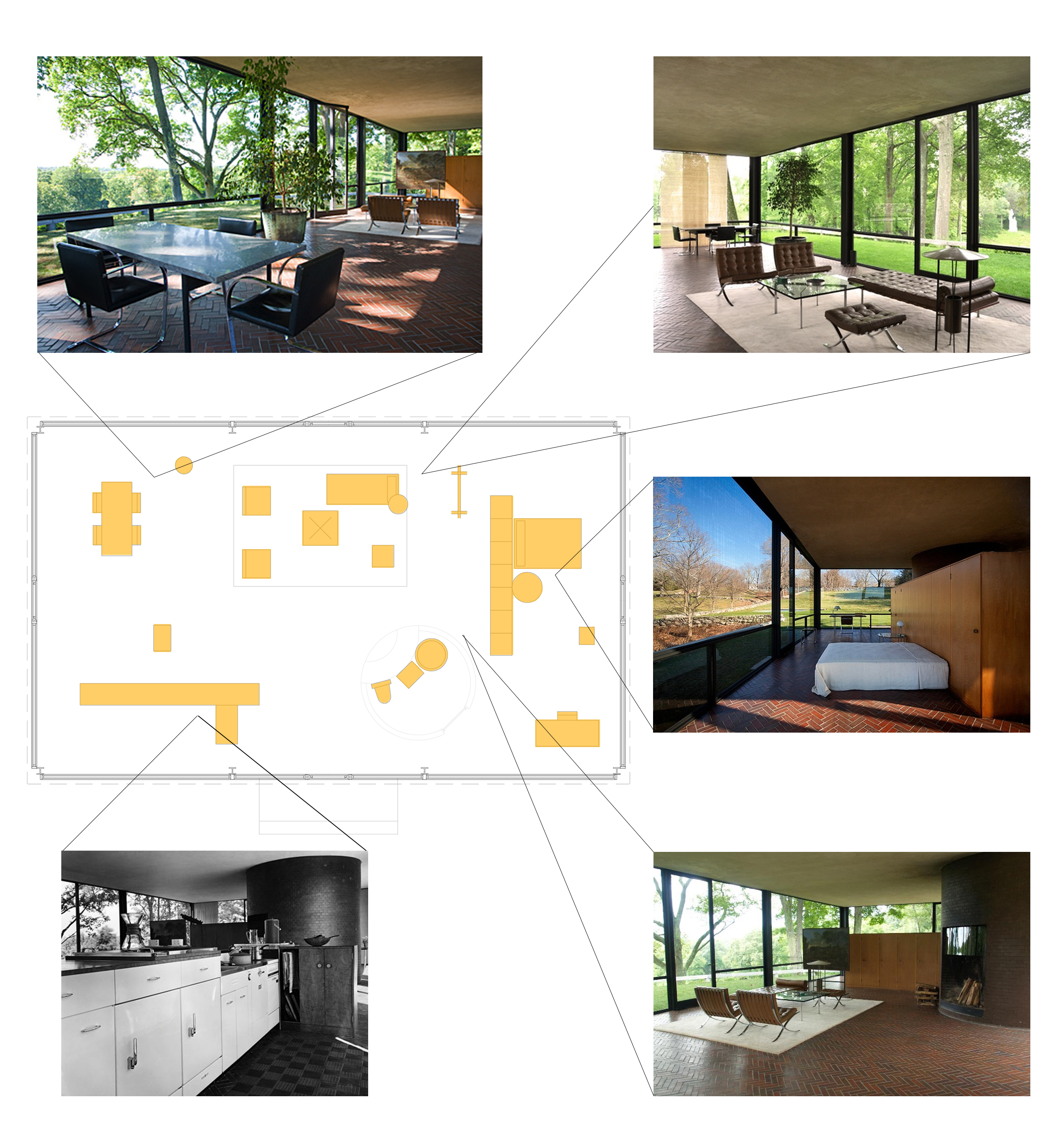 muebles diseñados por el